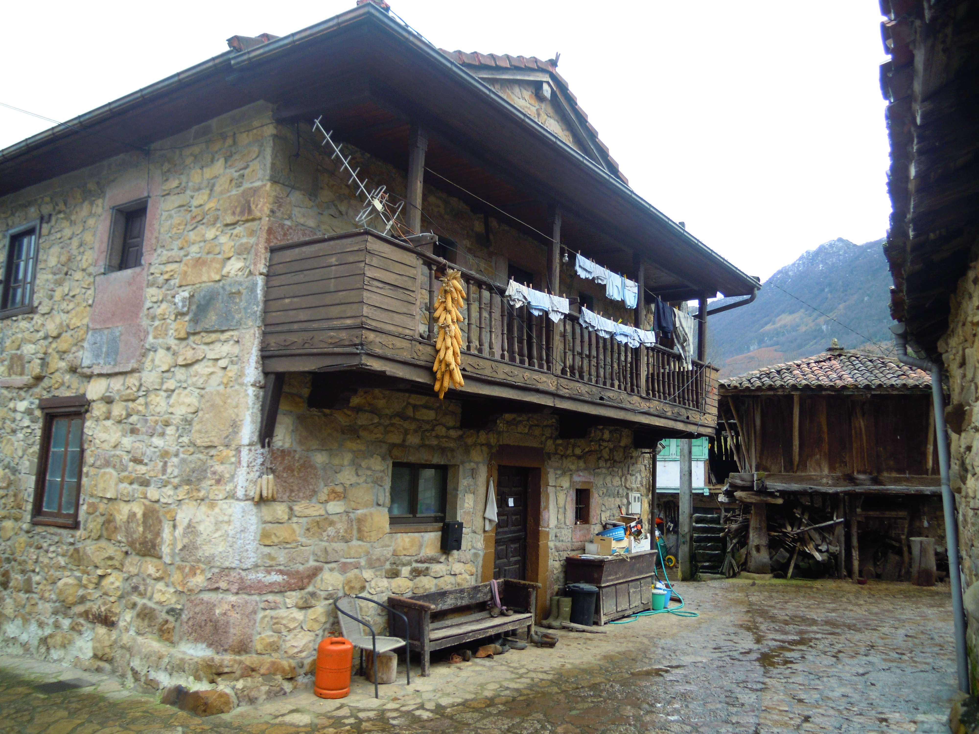 (Casu)